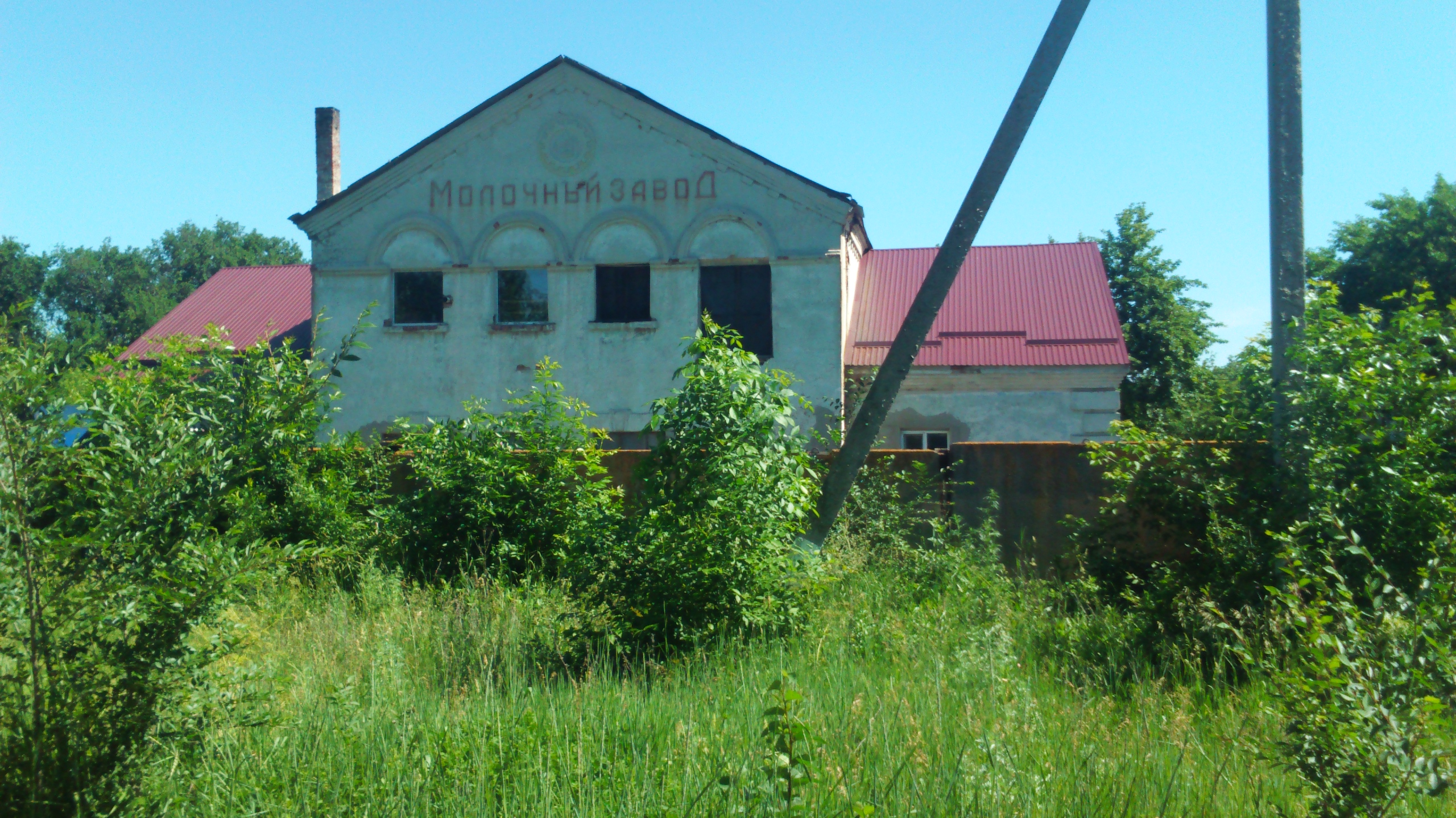 Світле — селище в Україні, Добропільському районі Донецької області, над річкою Водяна.